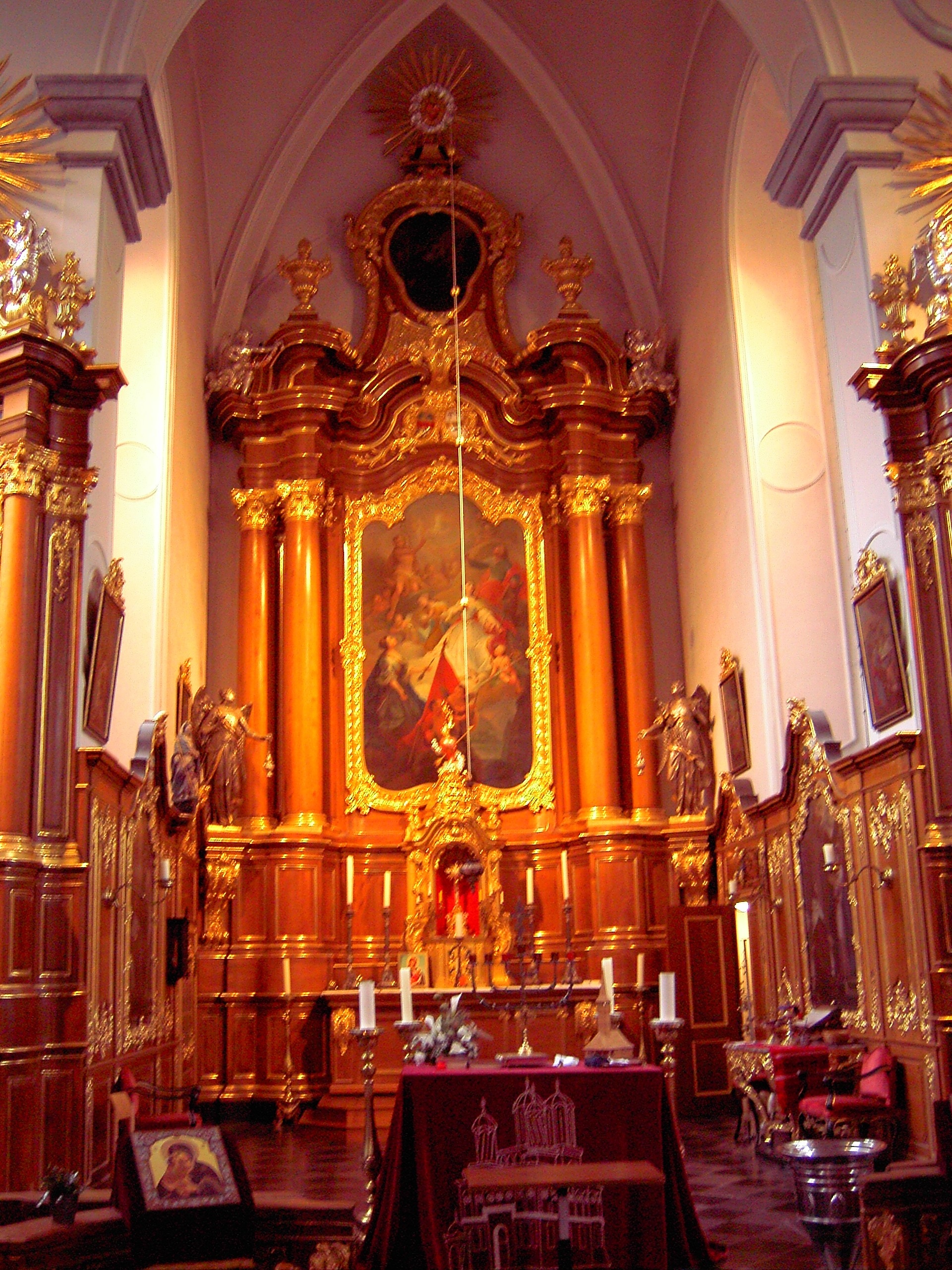 Altarraum der Theresienkirche